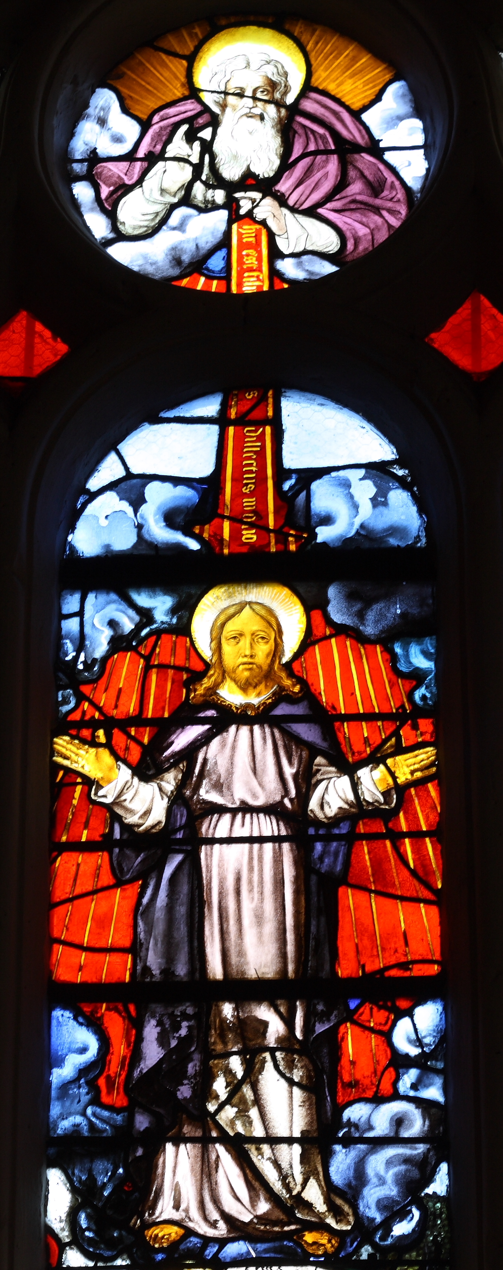 Katholische Pfarrkirche Saint-Martin in Triel-sur-Seine, einer Gemeinde im Département Yvelines (Île-de-France), Bleiglasfenster aus dem 16. Jahrhundert, Darstellung: Gottvater und Jesus; Ausschnitt (mittlere Lanzette) aus dem Fenster der Verklärung Christi